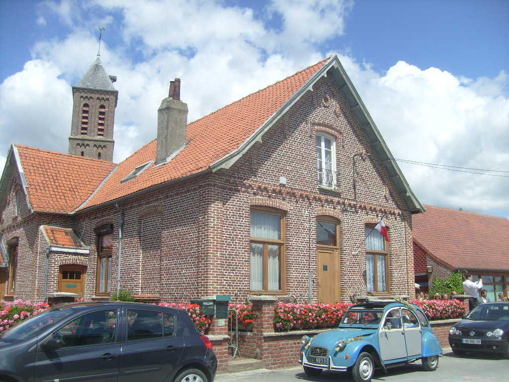 mairie de Bissezeele